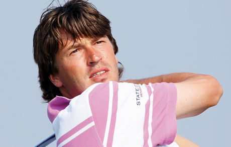 Robert-Jan Derksen, Dutch golfprofessional